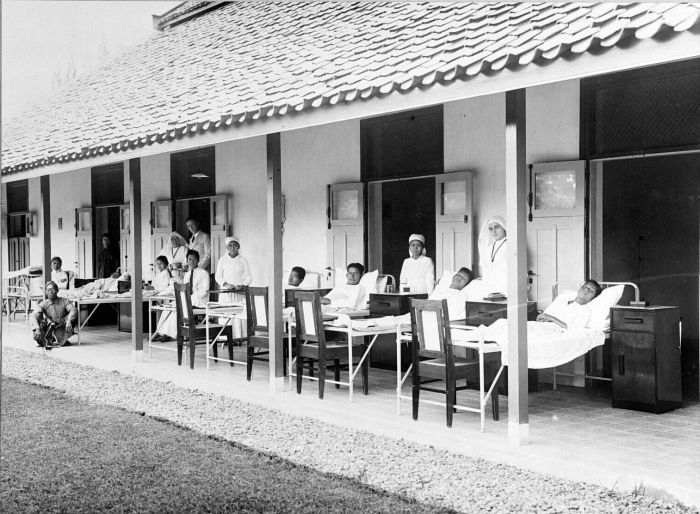 Repronegatief. Panti Rapih Hospital (Rumah Sakit Panti Rapih) is one of the biggest private hospitals in Yogyakarta, Indonesia. It was founded in 1929 by five sisters from St. Carolus Borromeus.